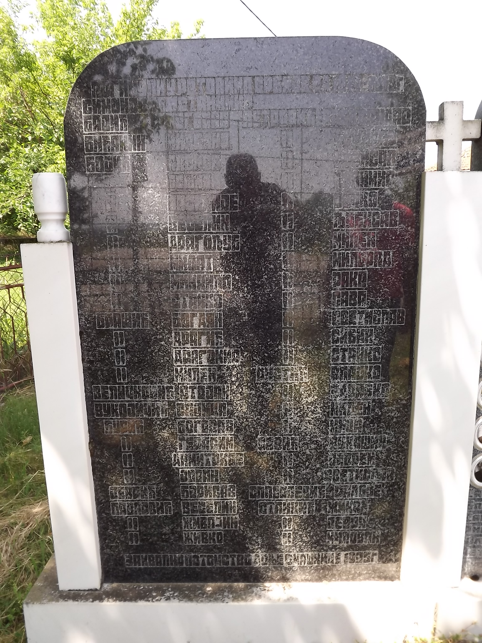 Srpski (latinica): Spomenik borcima u oslobodilačkim ratovima, selo Omašnica. Fotografija nastala u okviru saradnje Narodnog univerziteta Trstenik. Narodne biblioteke Jefimija i Saveza Boraca Trstenik.